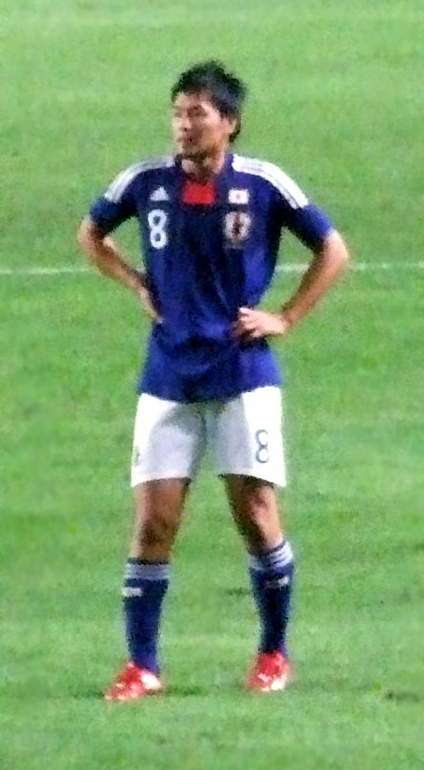 中文（香港）: 松井大輔